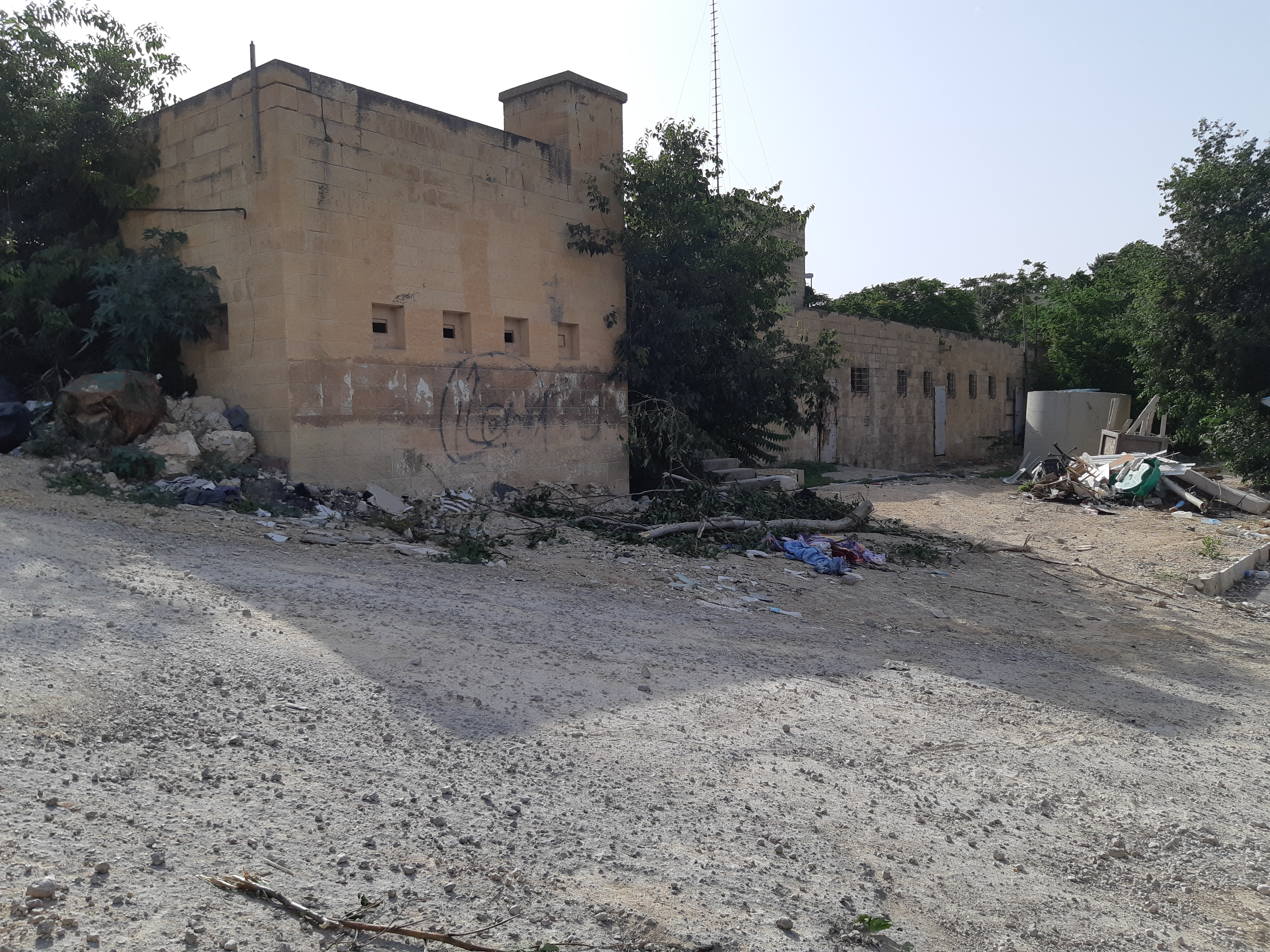 משטרת אבו גוש - מבט מבחוץ